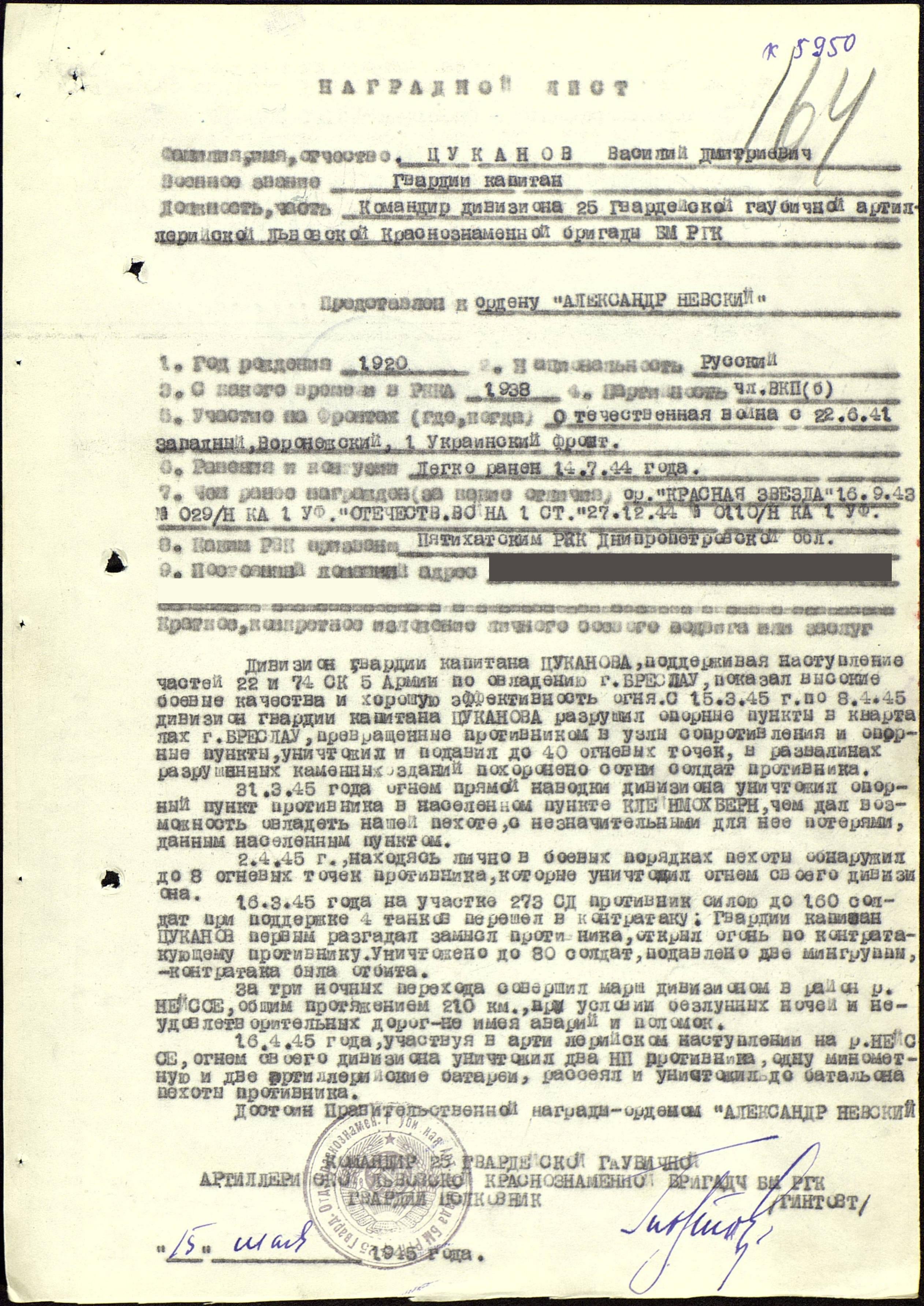 Скан наградного листа от 15.05.1945. Из архива МО РФ.